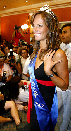 Diana Bolocco recibiendo la corona de Reina del Festival Internacional de la Canción de Viña del Mar 2007. 24 de febrero de 2007.